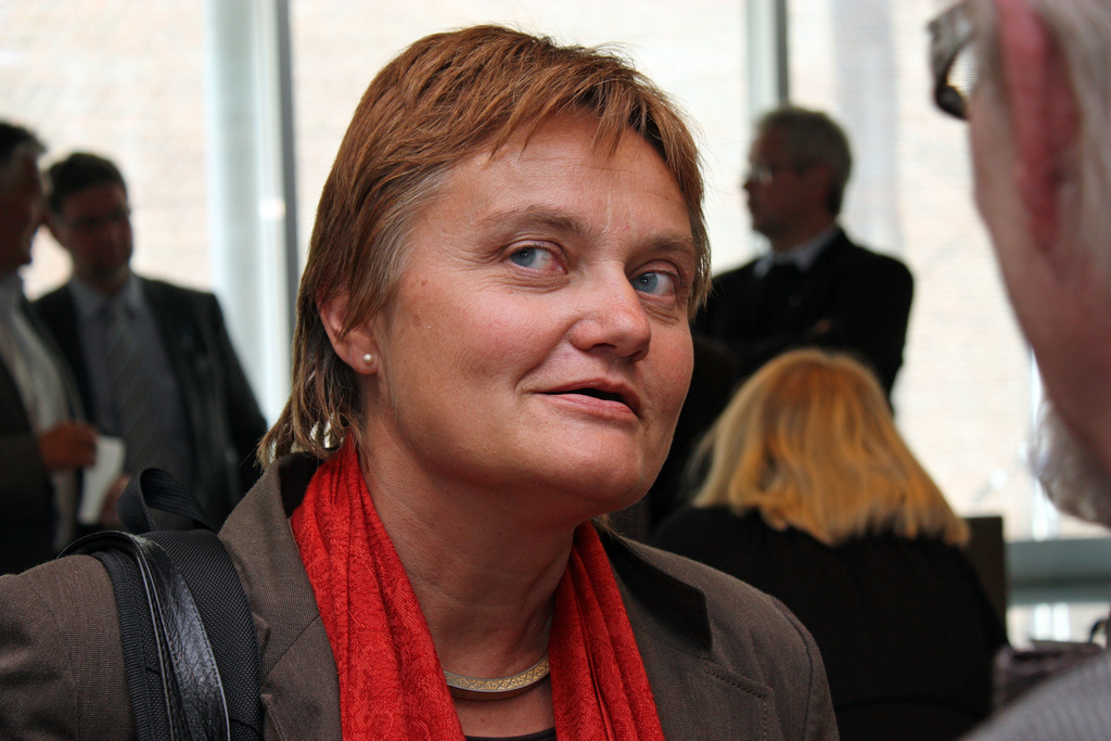 Rigmor Aasrud